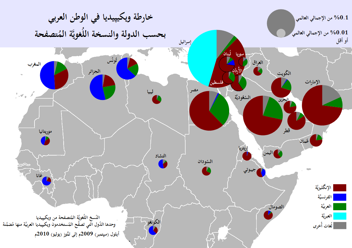 خارطة تُظهر نسبة تصفُّح ويكيپيديا العربيَّة في الوطن العربي وبعض أنحاء أفريقيا، مُقارنةً بِنُسخٍ لُغويَّةٍ أُخرى.